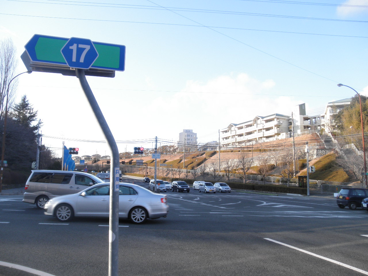 兵庫県三田市挟間が丘1丁目 兵庫県道720号テクノパーク三田線